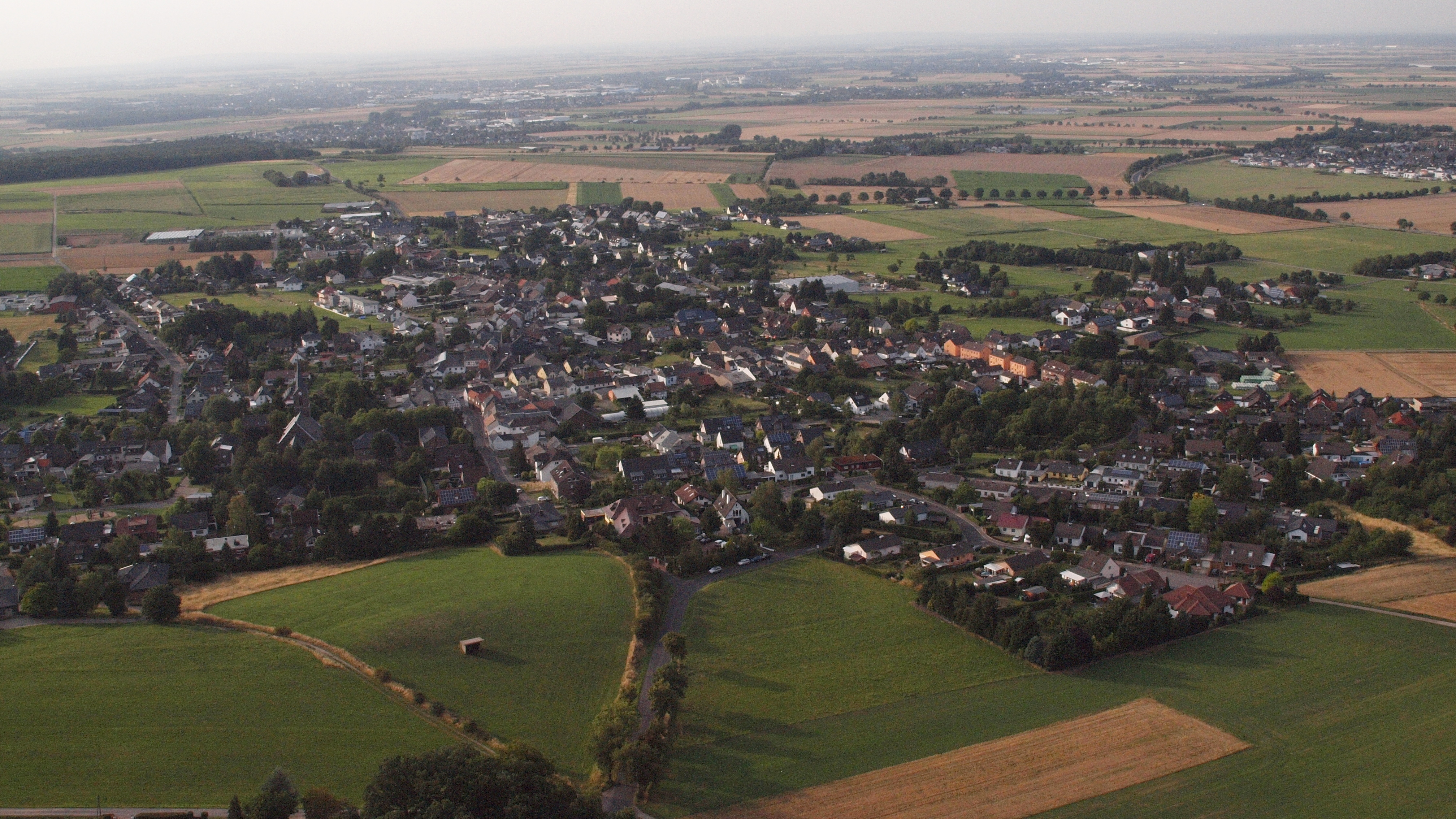 Kirchheim (Euskirchen), Luftaufnahme (2015)